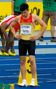 Robert Hering beim Start zum Semifinallauf 200m